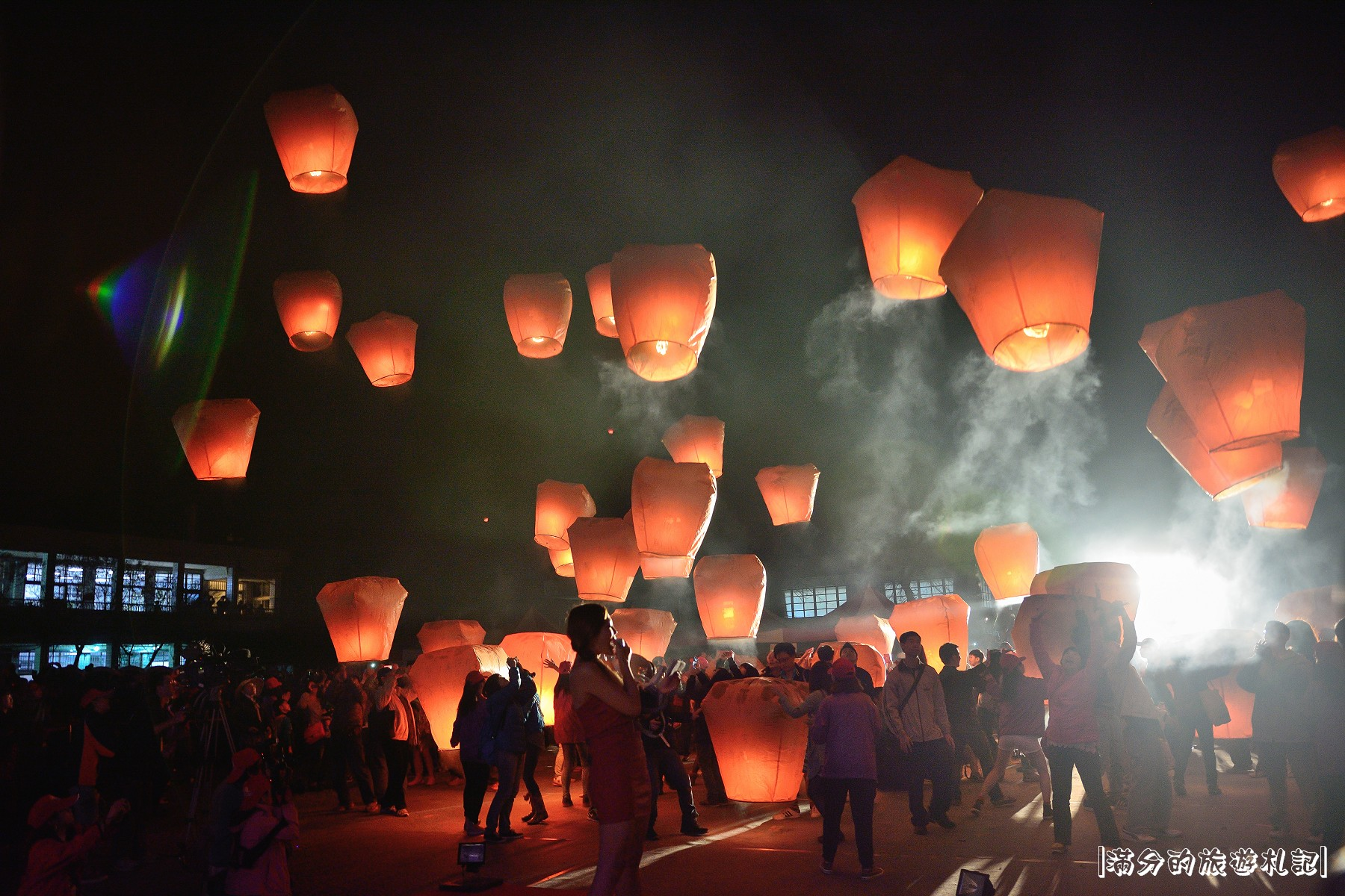 【新北景點】平溪。菁桐。十分一日遊